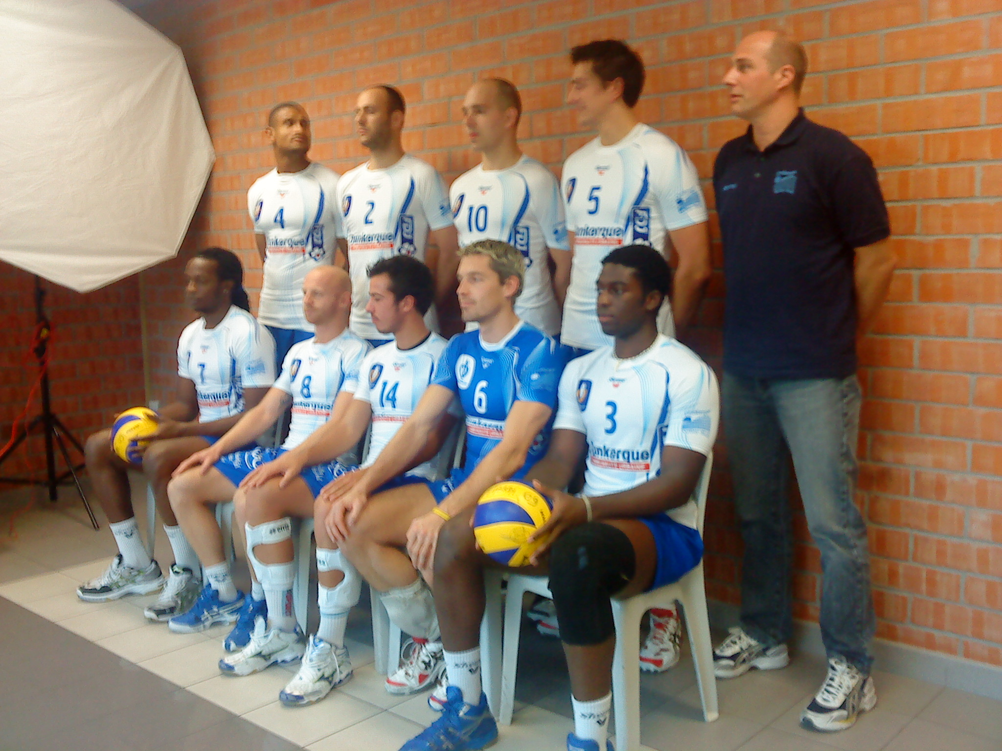 L'équipe du Dunkerque Grand Littoral Volley-Ball pour la saison 2010-2011